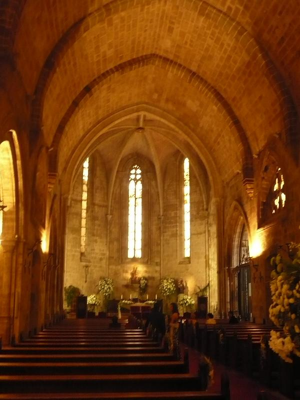 Interior de San Juan del hospital